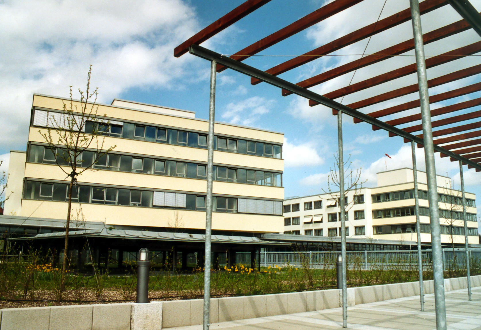 Wuerzburg University, Medical Center "Zentrum für Operative Medizin"